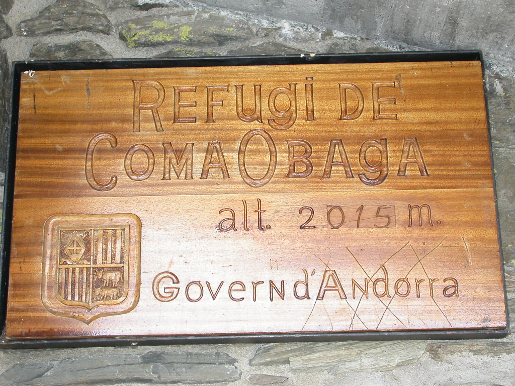 Refuges Andorre